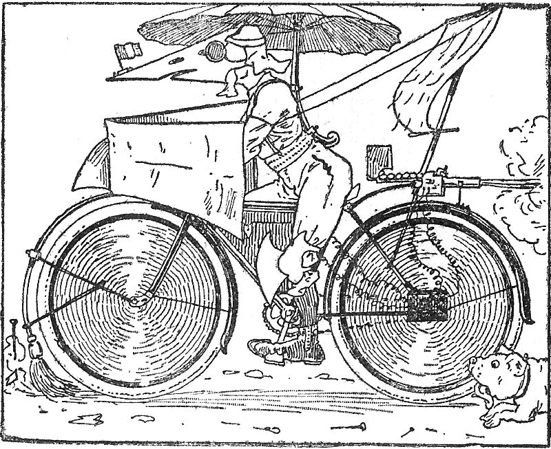 Anémélectroreculpédalicoupeventombrosoparacloucycle. Gravure de Christophe 1893.